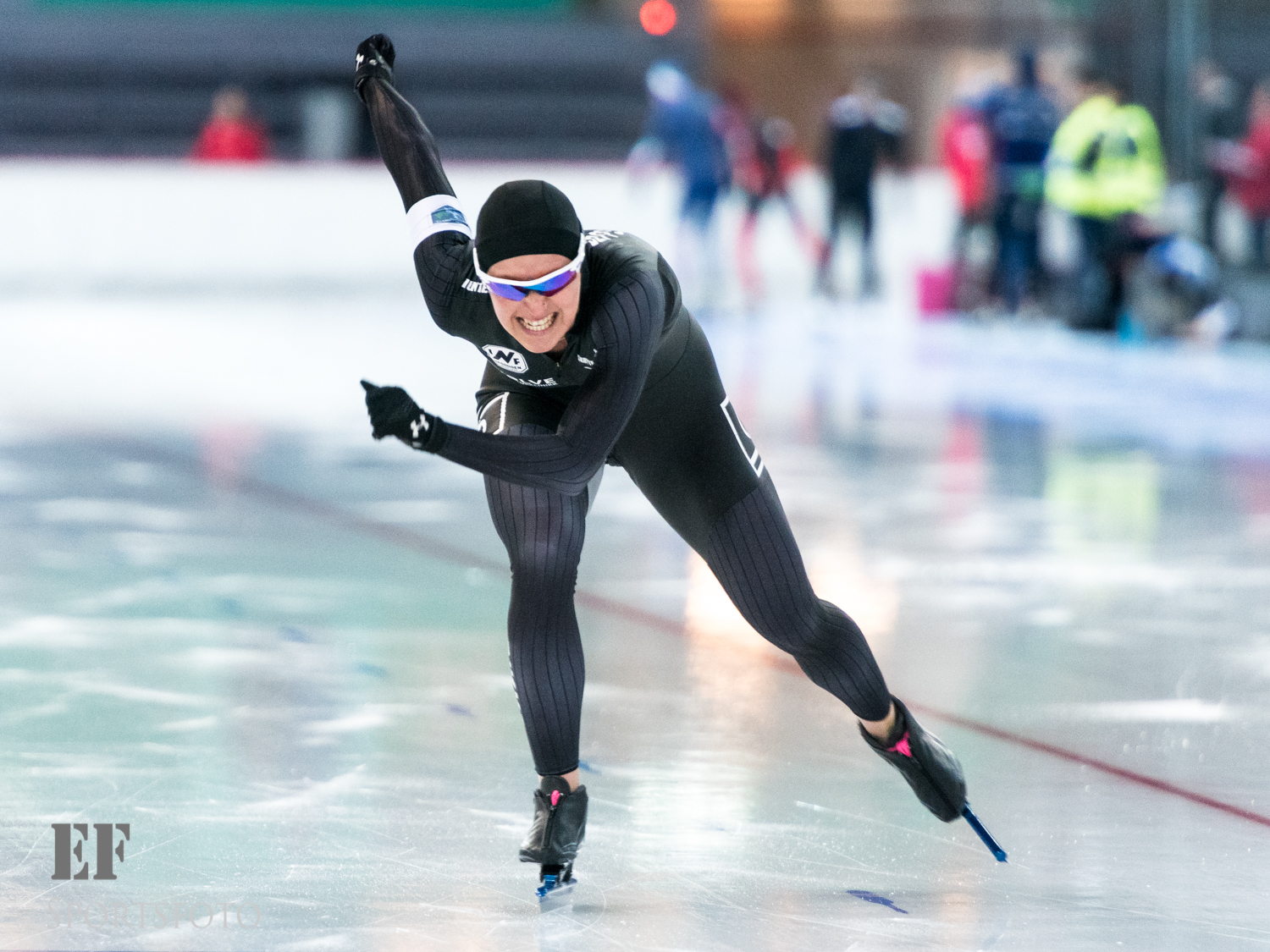 Rikke Jeppsson i aksjon på 500m under Norges cup 1 i Vikingskipet på Hamar oktober 2017